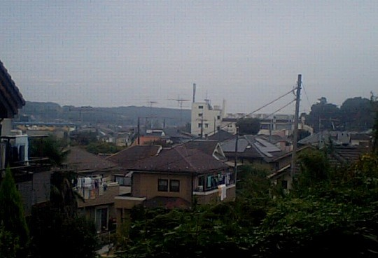 東京都武蔵村山市中藤